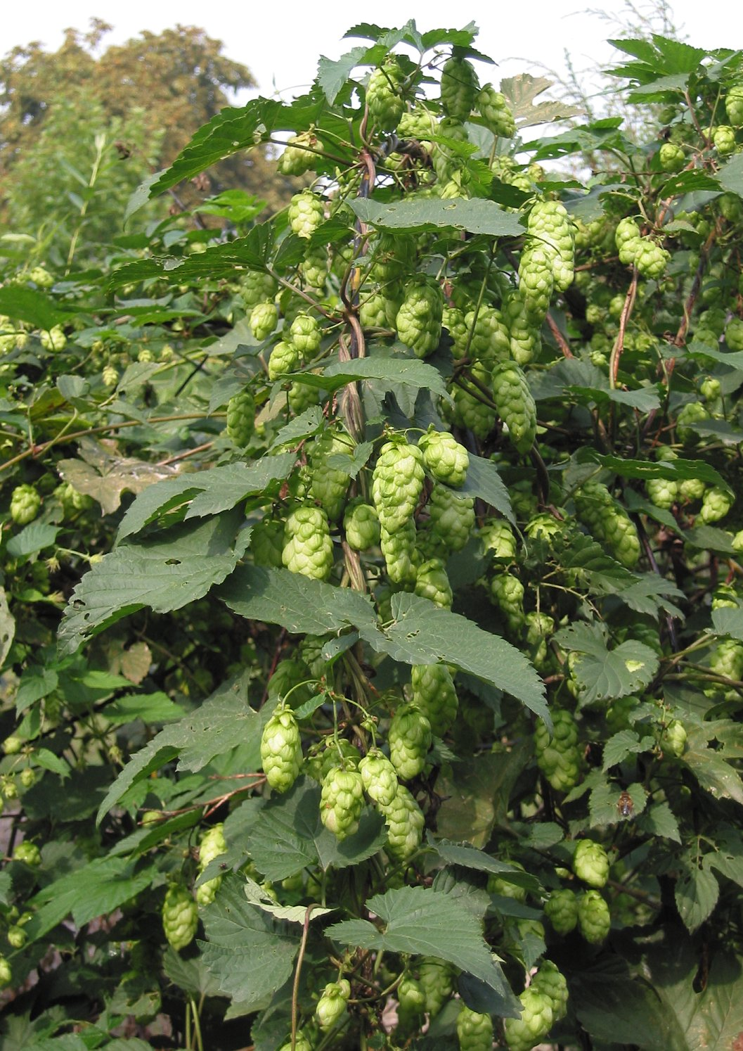 (nl: Hop bloemen vrouwelijke plant) Humulus lupulus female plant